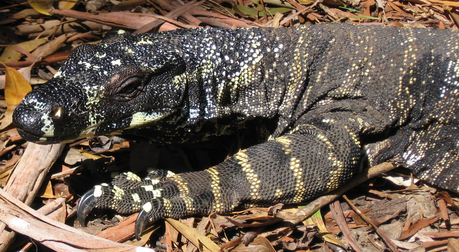 Goanna (Varanus varius)